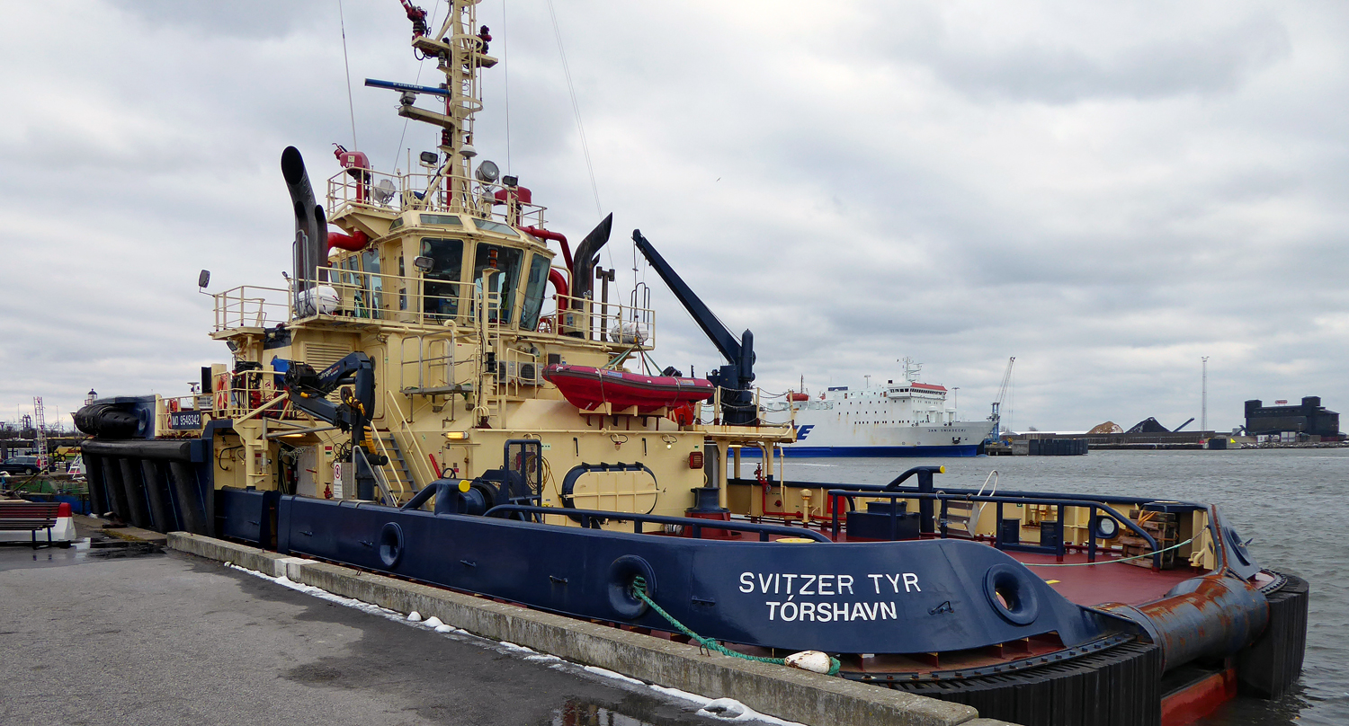 Svitzer Tyr är en bogserbåt, byggd i Kina 2011, här i Ystads hamn 28 mars 2018.